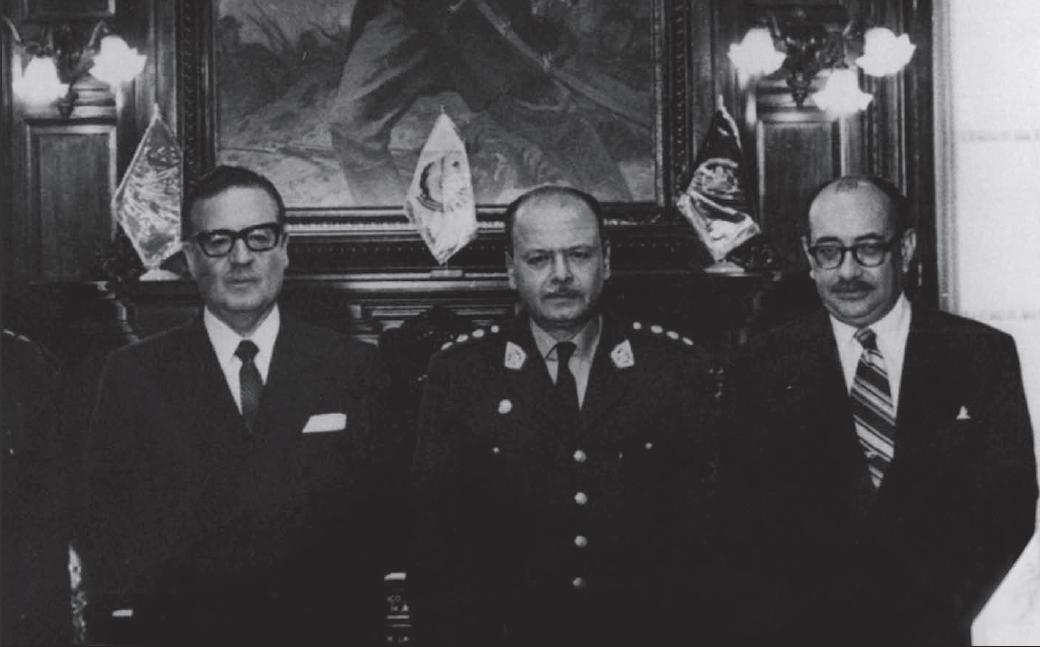 Visita oficial a Perú en 1970: Salvador Allende, Presidente Velasco Alvarado y Canciller Clodomiro Almeyda